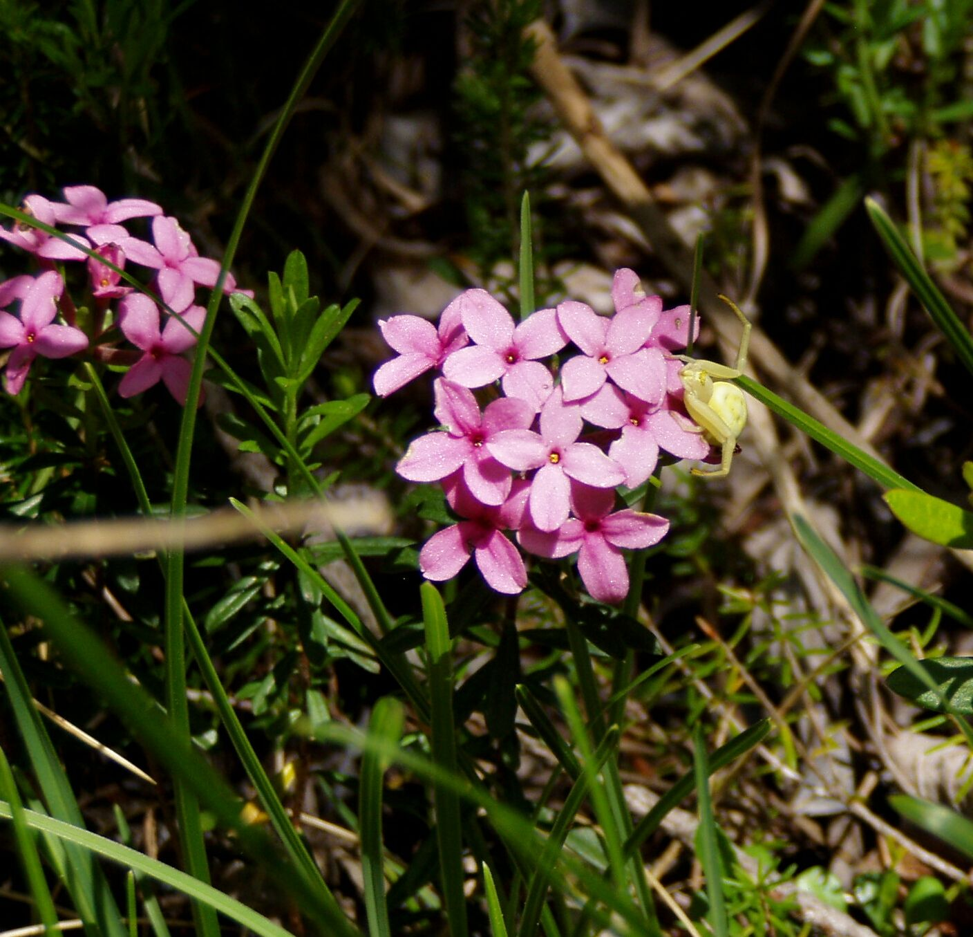 Daphne cneorum. Tscheppaschlucht, Karawanken, Carinthia. app. 600-650 m. Sitting on it: Misumena vatia